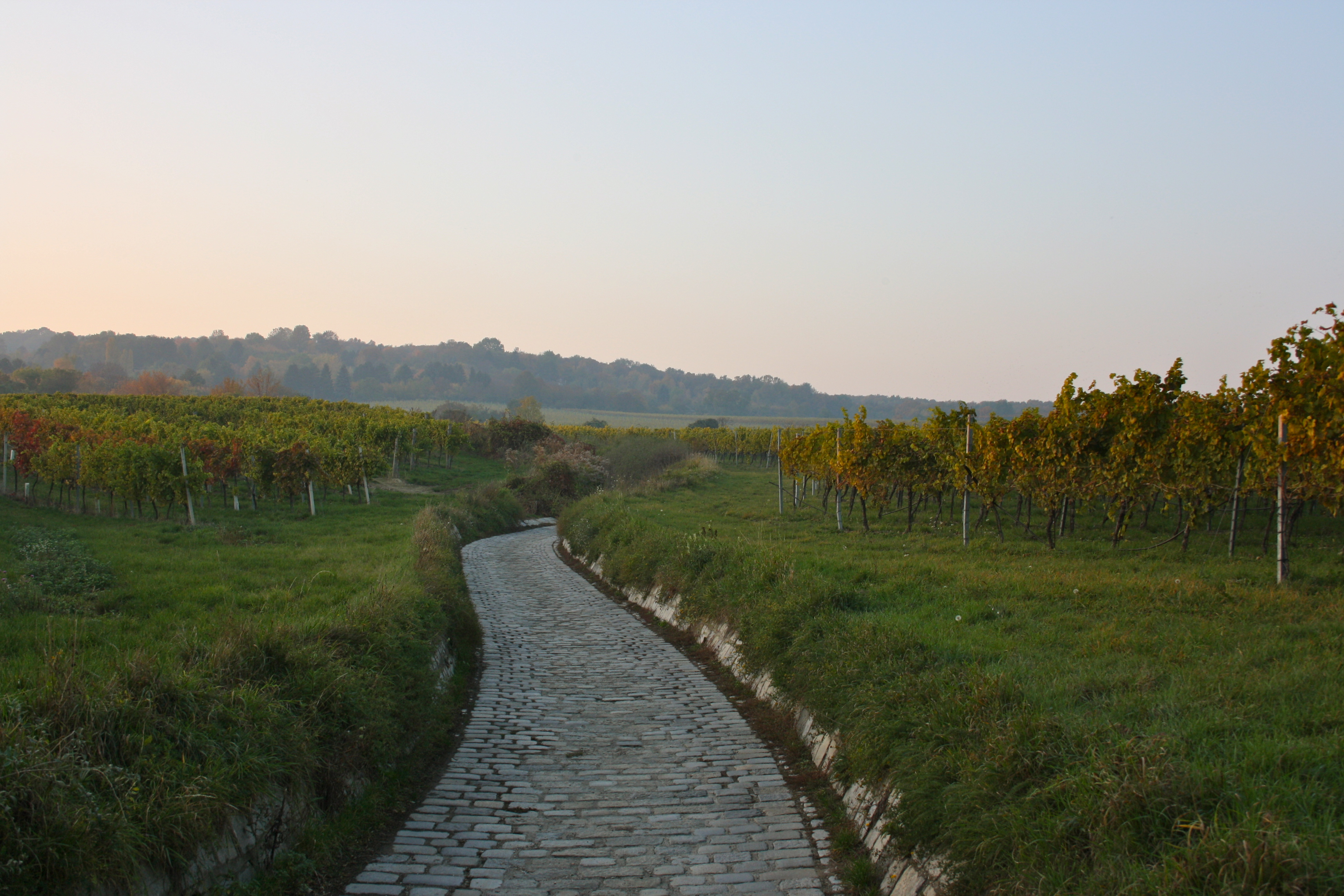 Kallusweg in Wien-Stammersdorf, Blick auf die Weingärten am Falkenberg.